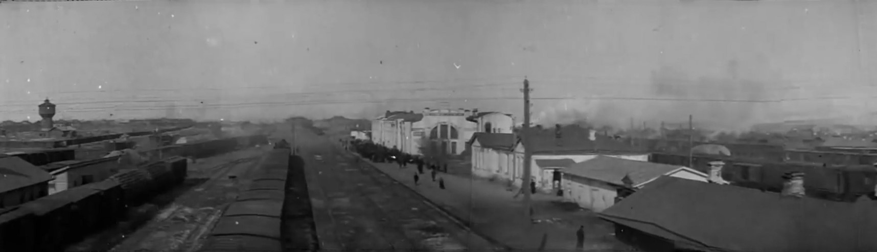 Станция Новониколаевск. Вокзал. Склейка из кадров французской кинохроники 1919 года в Microsoft Image Composite Editor